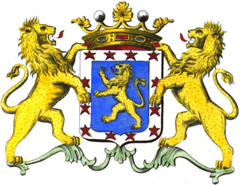 Armoiries de la famille Steenhault